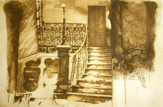 Grabado de Sánchez Baillo